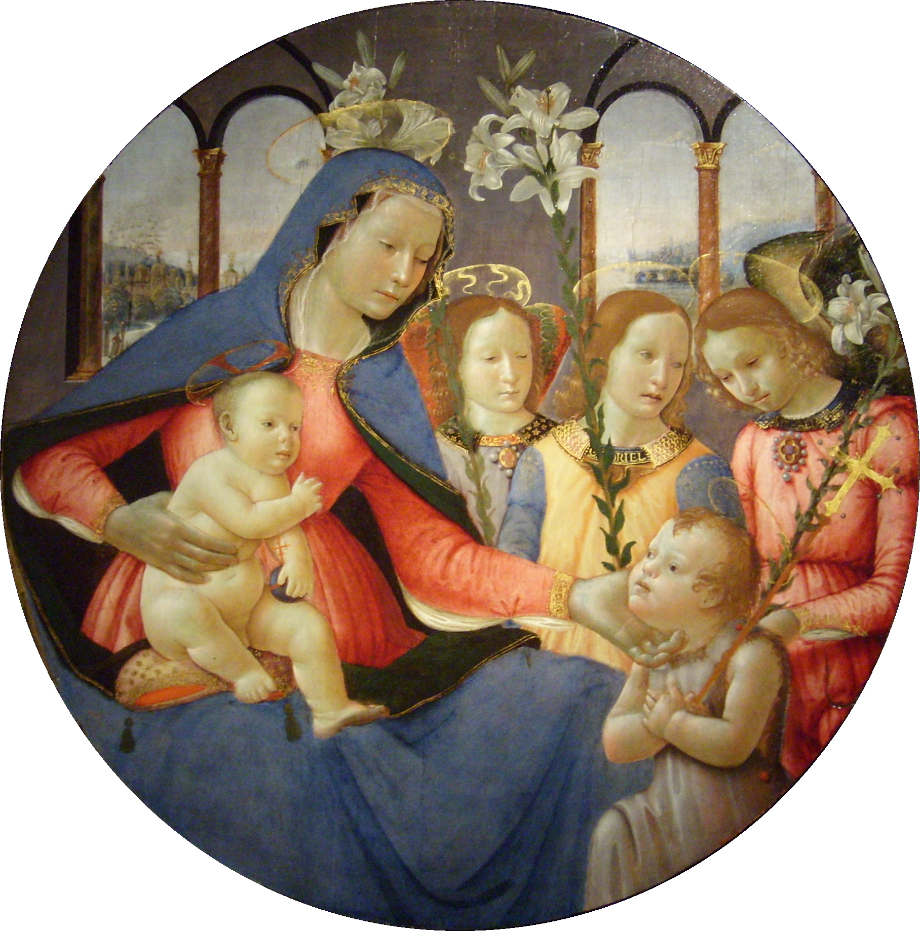 Musée Thomas-Henry, Cherbourg-Octeville La Vierge à l'Enfant avec saint Jean Baptiste et les trois anges, Sebastiano Mainardi Huille et tempera sur bois